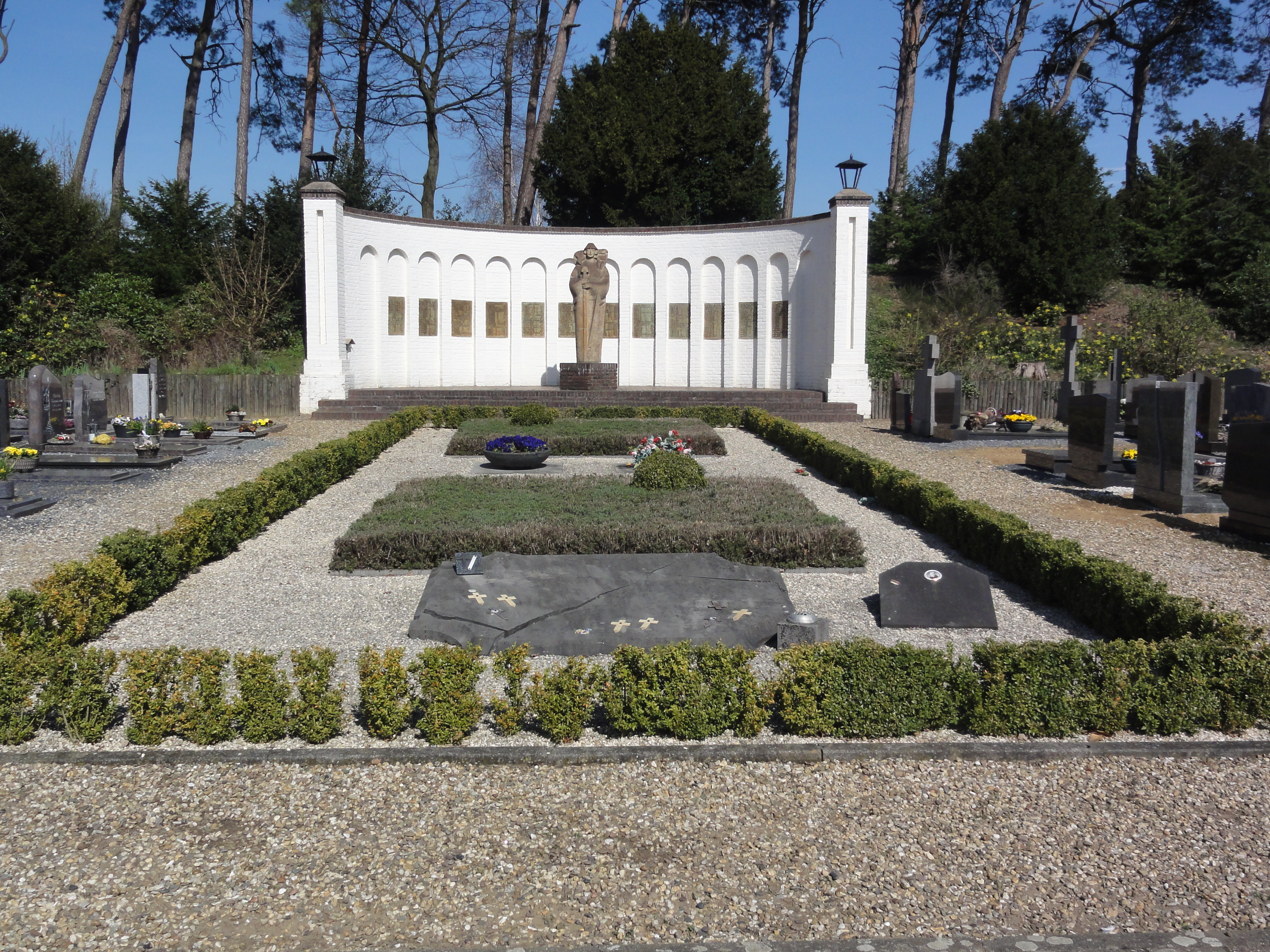 Montfort (Limburg) massagraf, overzichtsfoto. Het grafmonument in Montfort (gemeente Roerdalen) is opgericht ter nagedachtenis aan de 186 oorlogsslachtoffers uit Montfort en omliggende dorpen.